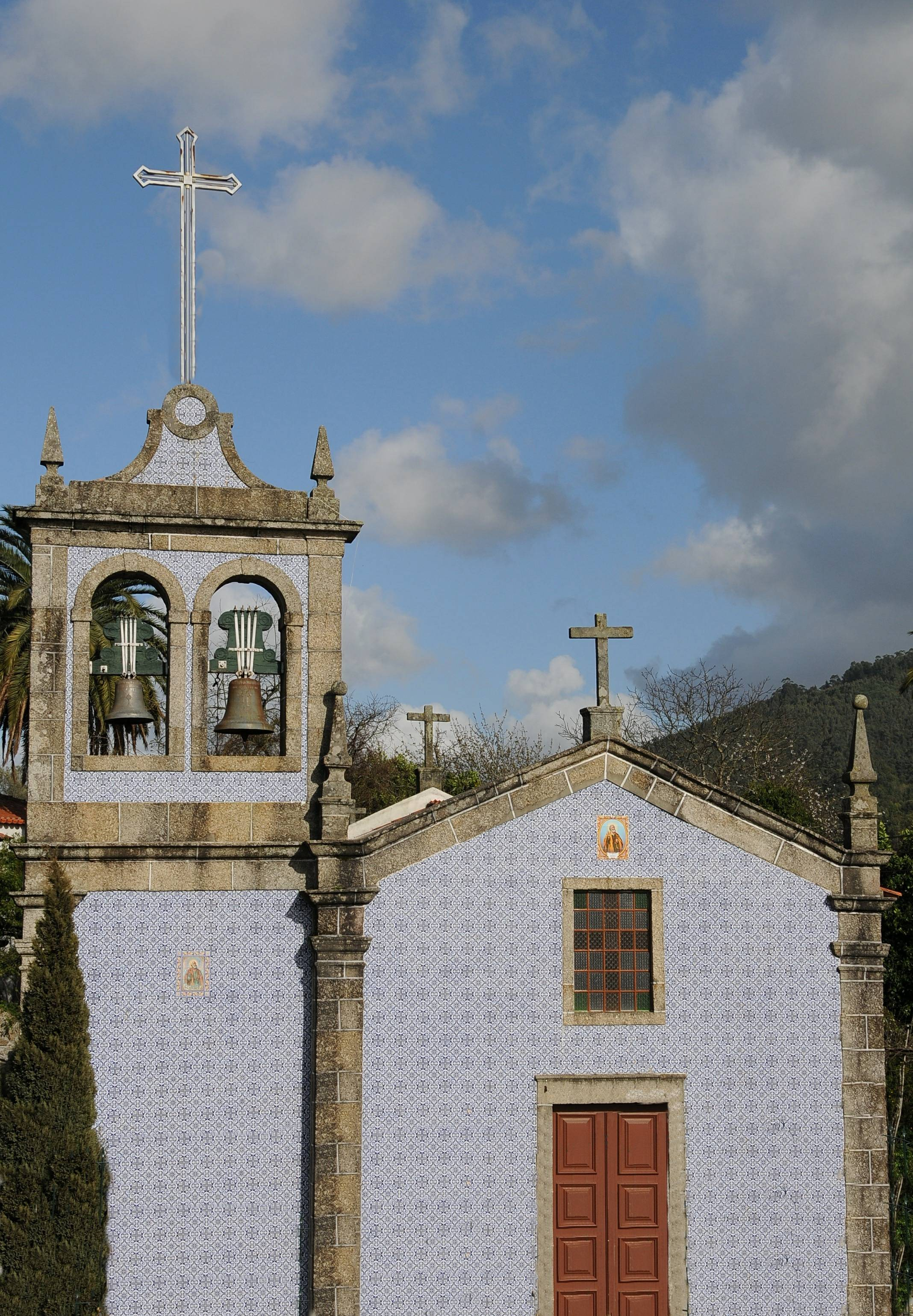 Oliveira Church, in Braga, Portugal